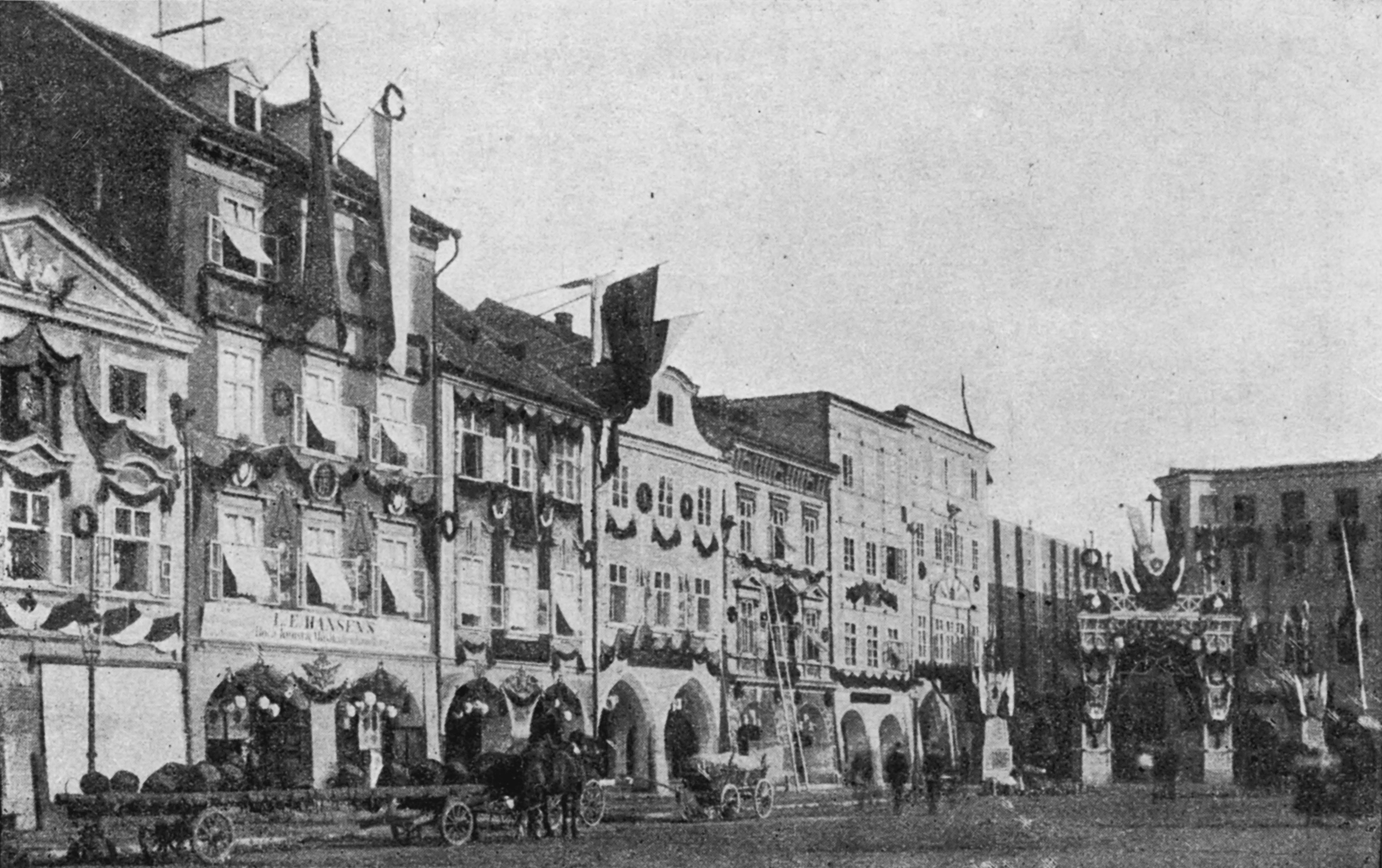 Album starých Budějovic. SZ část náměstí Přemysla Otakara II, vpravo Puklicův dům před dostavbou věžičky z roku 1902. (orig. text: Severozápadní kout náměstí u příležitosti návštěvy císaře Františka Josefa v l. 1895. Rohový dům v pravo před přestavbou.)